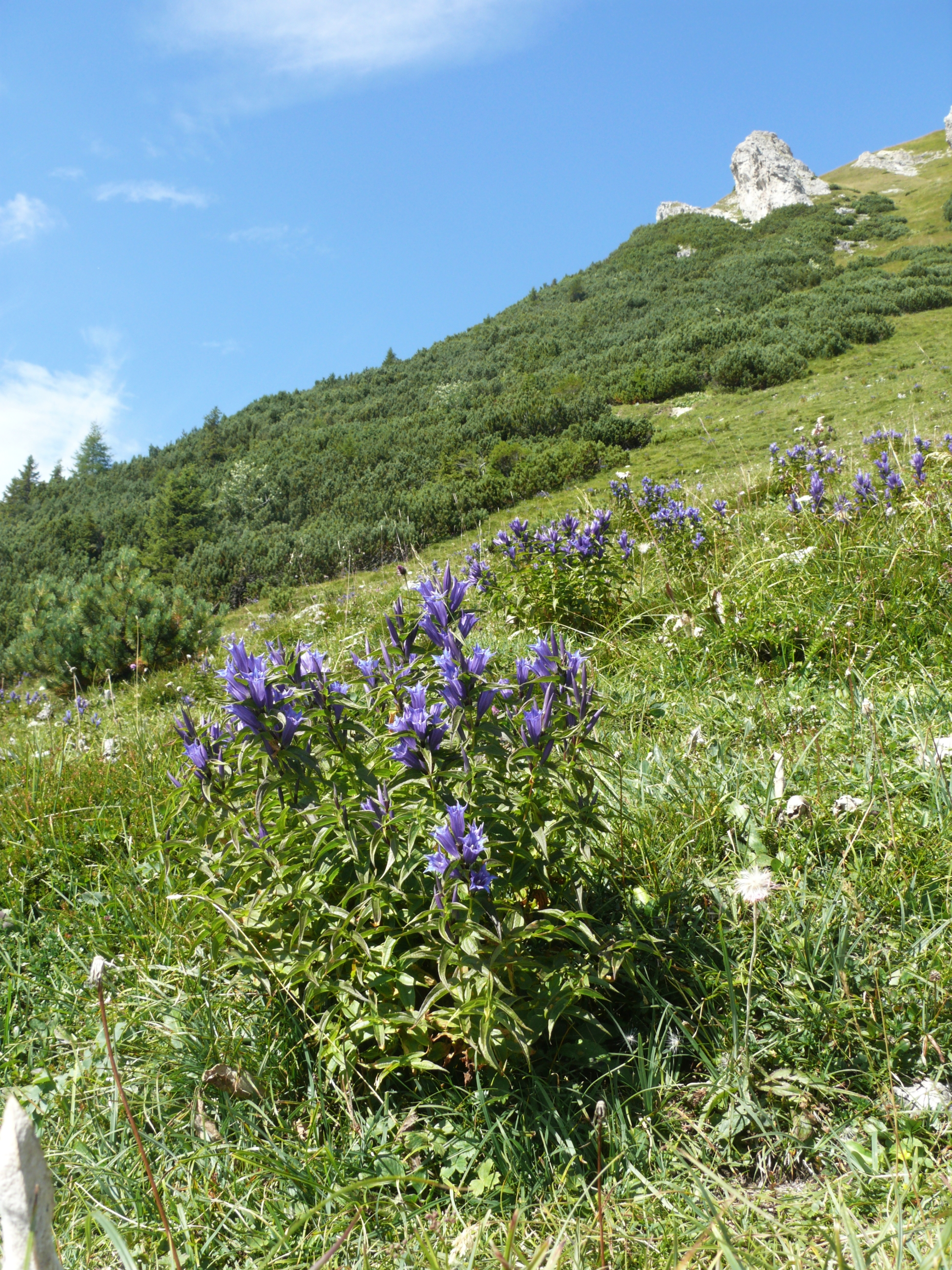 Gentiana asclepiadea, Stubaier Alpen, Italien